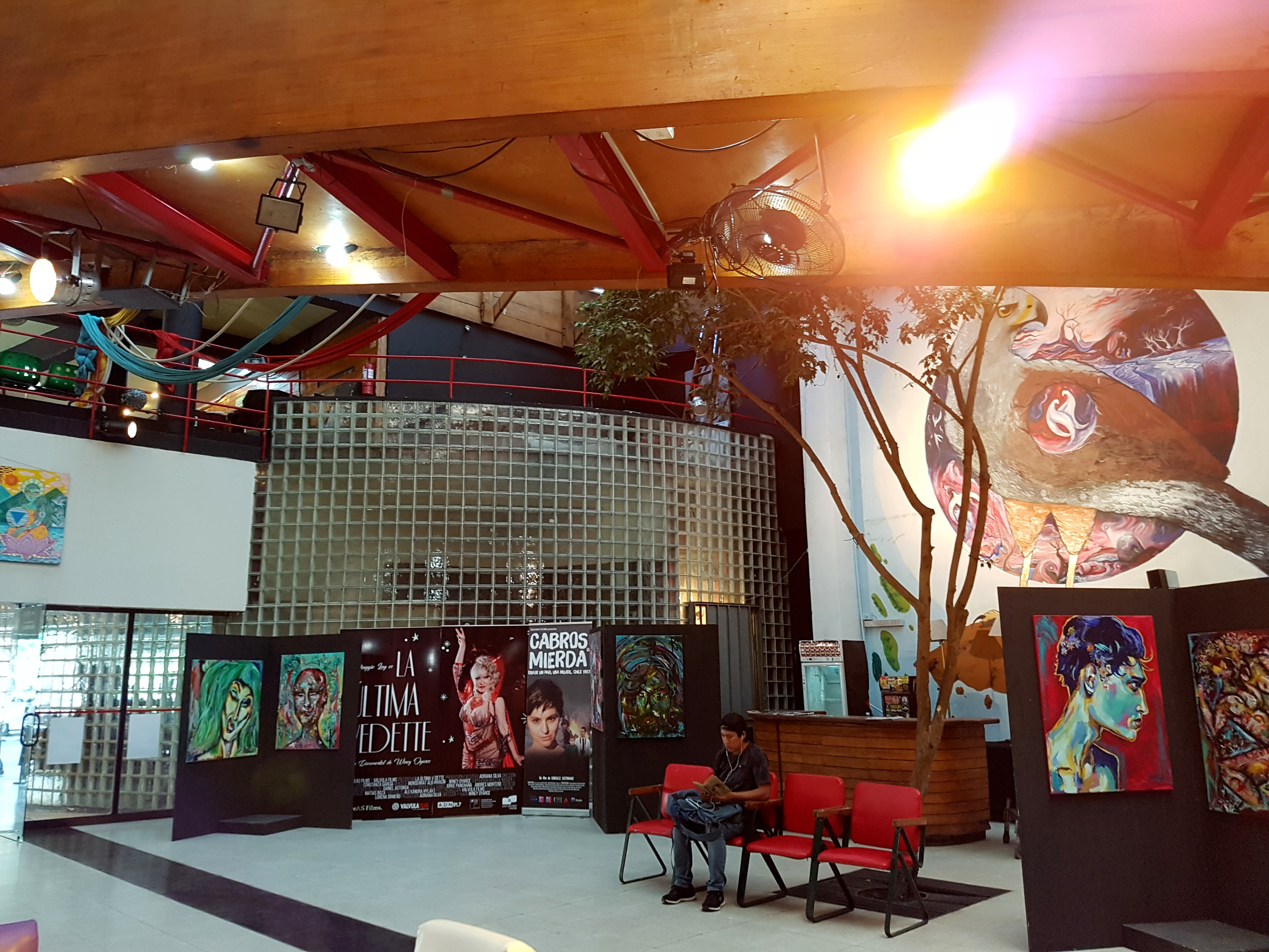 El Cine Arte Alameda queda en la Alameda Bernardo O'Higgins 139; oficialmente este espacio se ha convertido en un complejo cultural, el Centro Arte Alameda, en el que, además del cine arte, que funciona desde 1992, comprende el Living, espacio en el que desde 2003 se realizan presentaciones de música en vivo (cada jueves, viernes y sábado), y el café arte. En el hall se organizan ferias y exposiciones diversas.